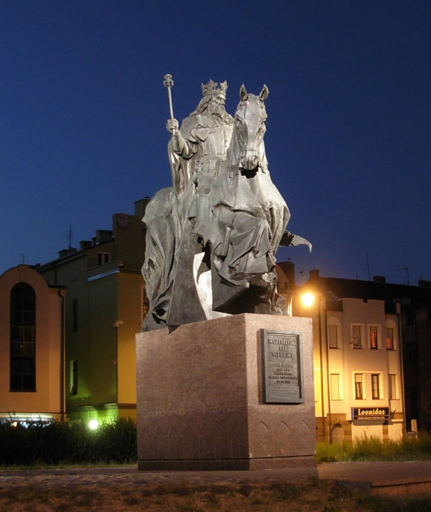 Pomnik Kazimierza Wielkiego w Bydgoszczy